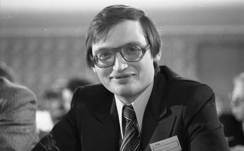 27. Bundesparteitag der F.D.P in Frankfurt am Main